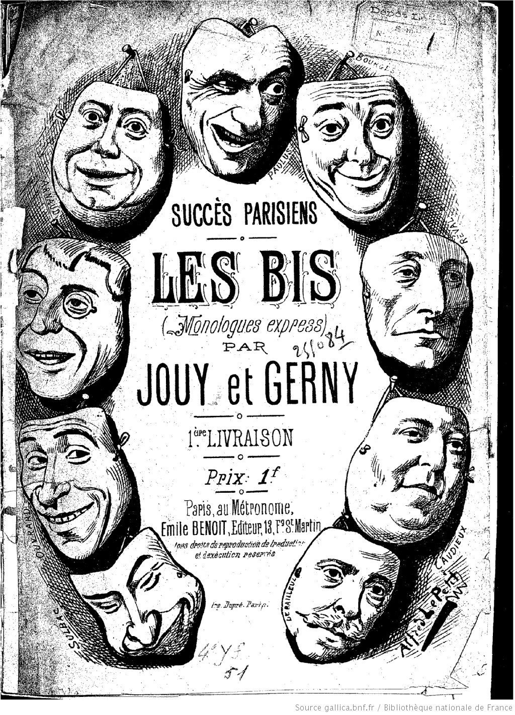 Les Bis, monologues de Jouy et Gerny